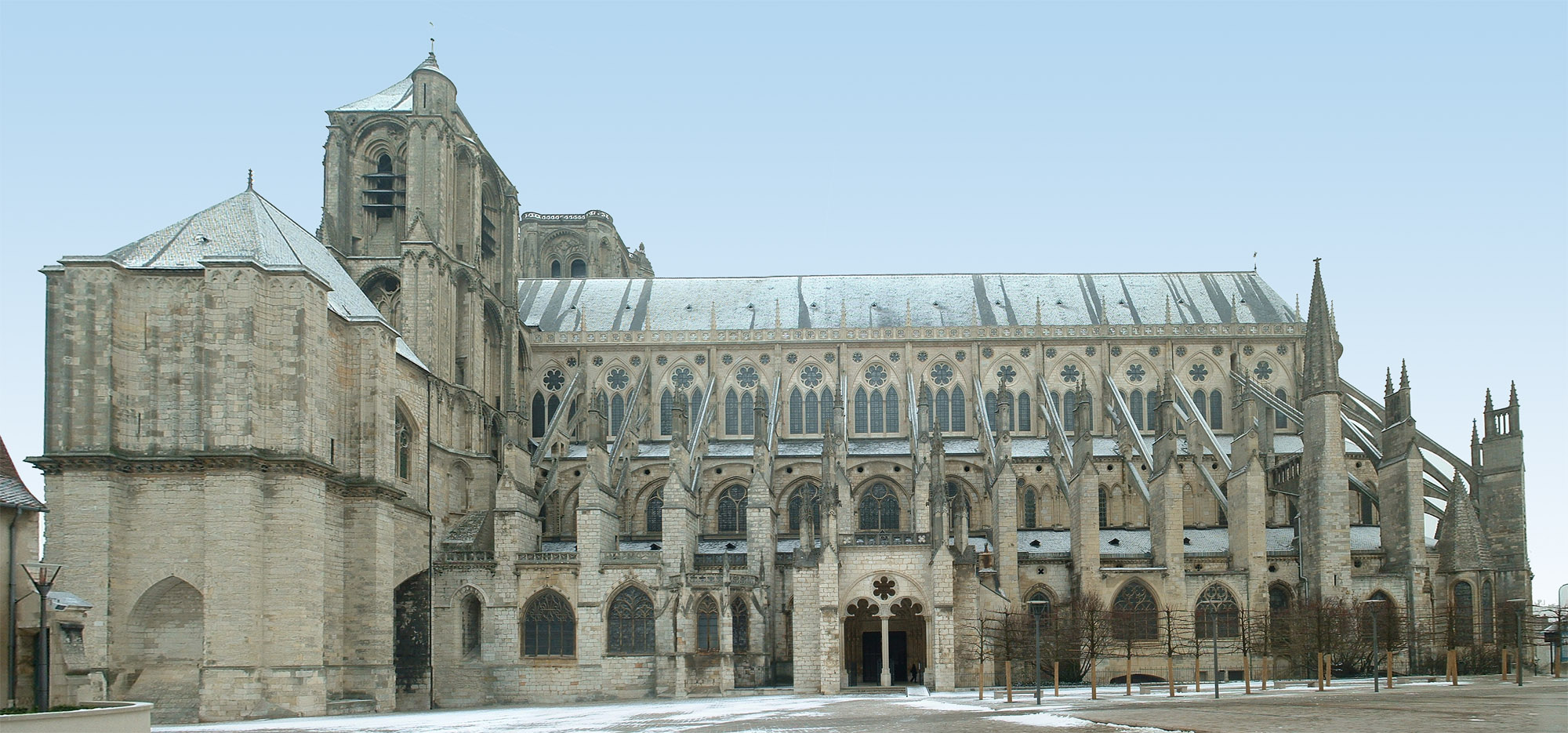 Montage photographique de wagner51. Prises de vue du 27 janvier 2006. La photo ayant été prise par mauvais temps (nuages, chute de neige), le ciel d'origine a été remplacé par un dégradé bleu ciel. Appareil photo : Fujifilm Finepix 2600 Zoom Montage effectué à partir de 6 photographies de taille 1600 × 1200.